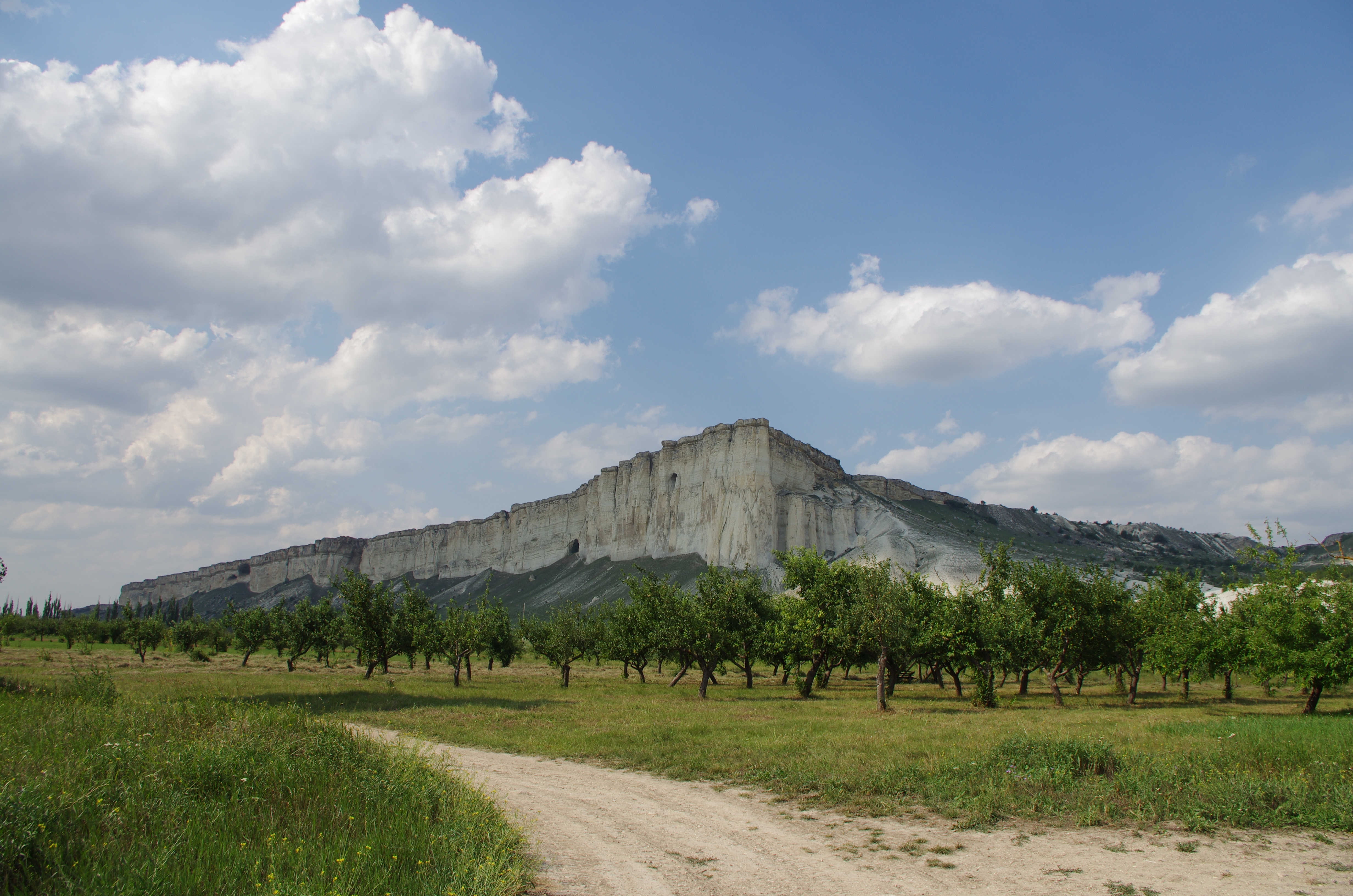 Zdjęcie przedstawia góre Ak-Kaja znajduącą się na Ukrainie.